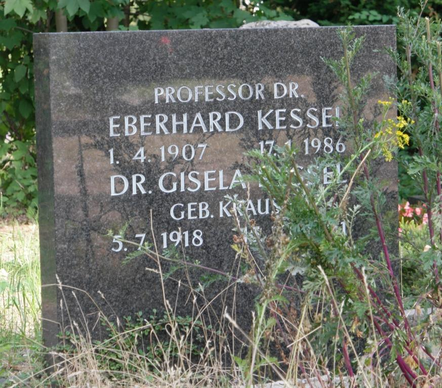 Grab des Historikers Eberhard Kessel, 1907-1986, auf dem Hauptfriedhof in Mainz